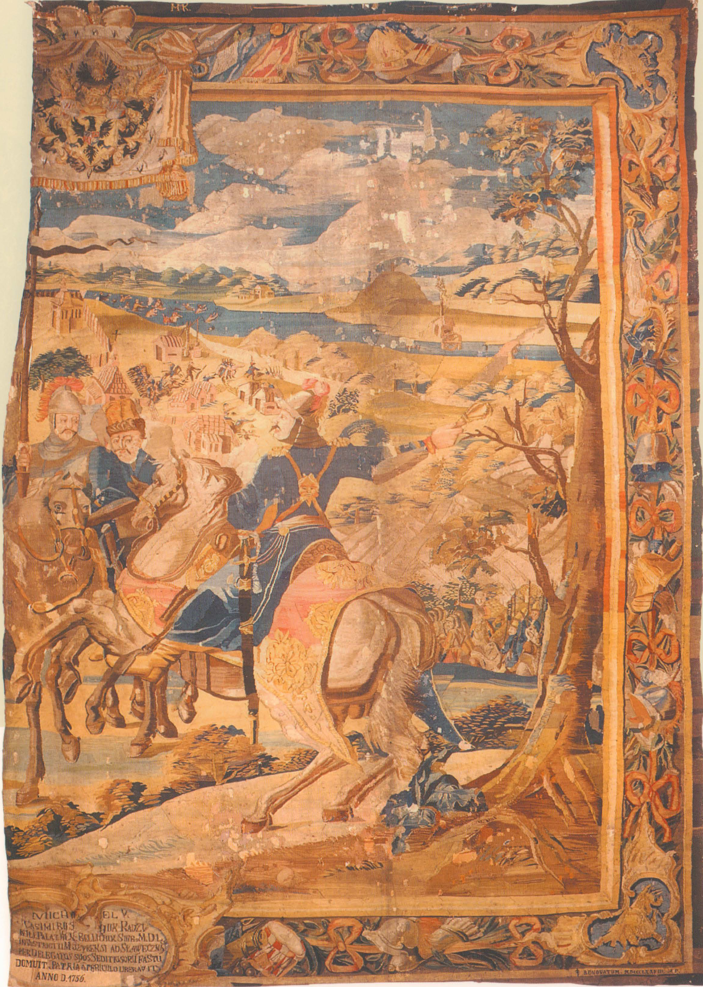 Беларуская (тарашкевіца): Бітва пад Славечнай (Słaviečna)